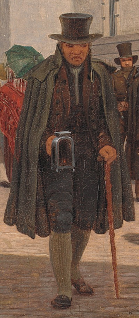 Udsnit af Martinus Rørbyes maleri: Arrestbygningen ved råd- og domhusetDepicted place: (55°40′36″N 12°34′20″E / 55.676734°N 12.572104°E)